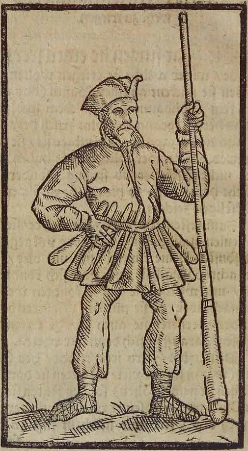 Prußischer Krieger, Stich von 1584